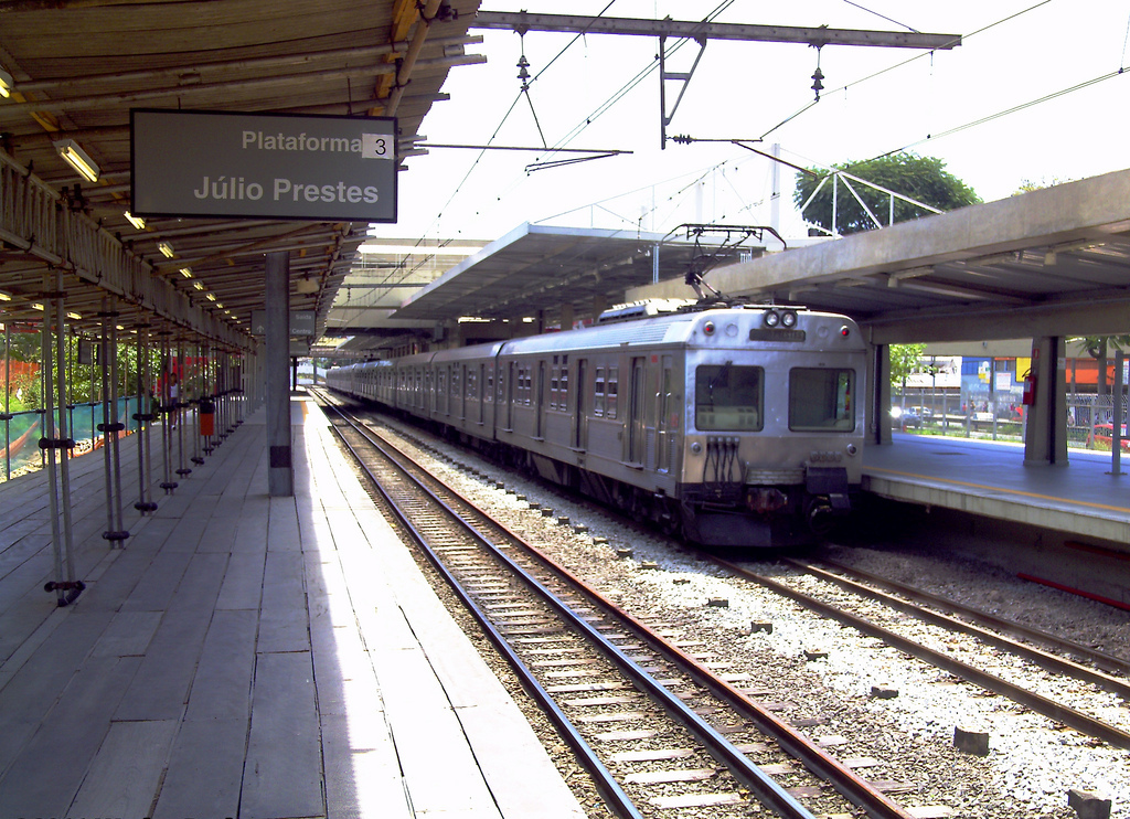 Trem Série 5000 partindo de Itapevi